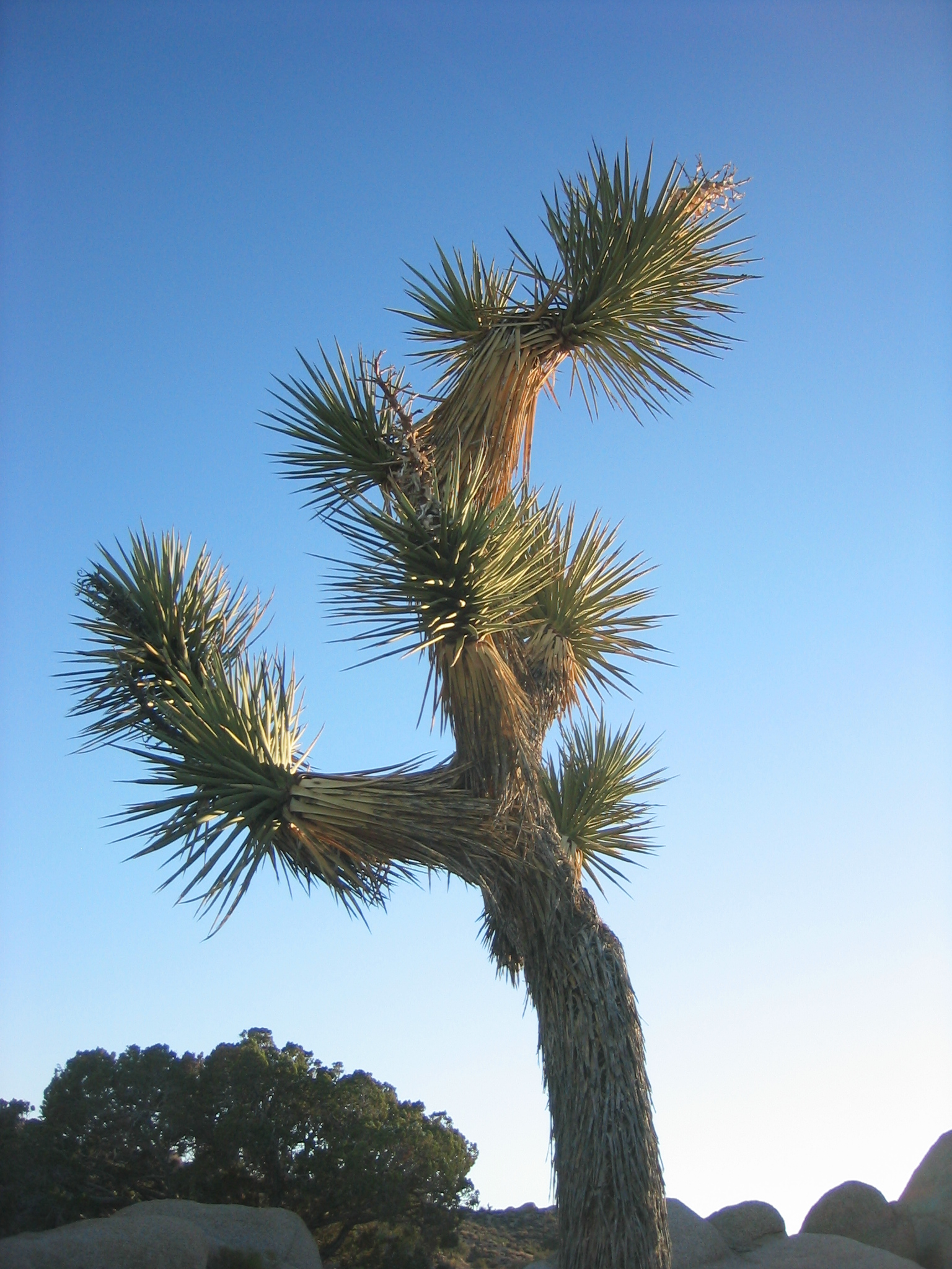 Joshua Tree im Joshua Tree Nationalpark 2004